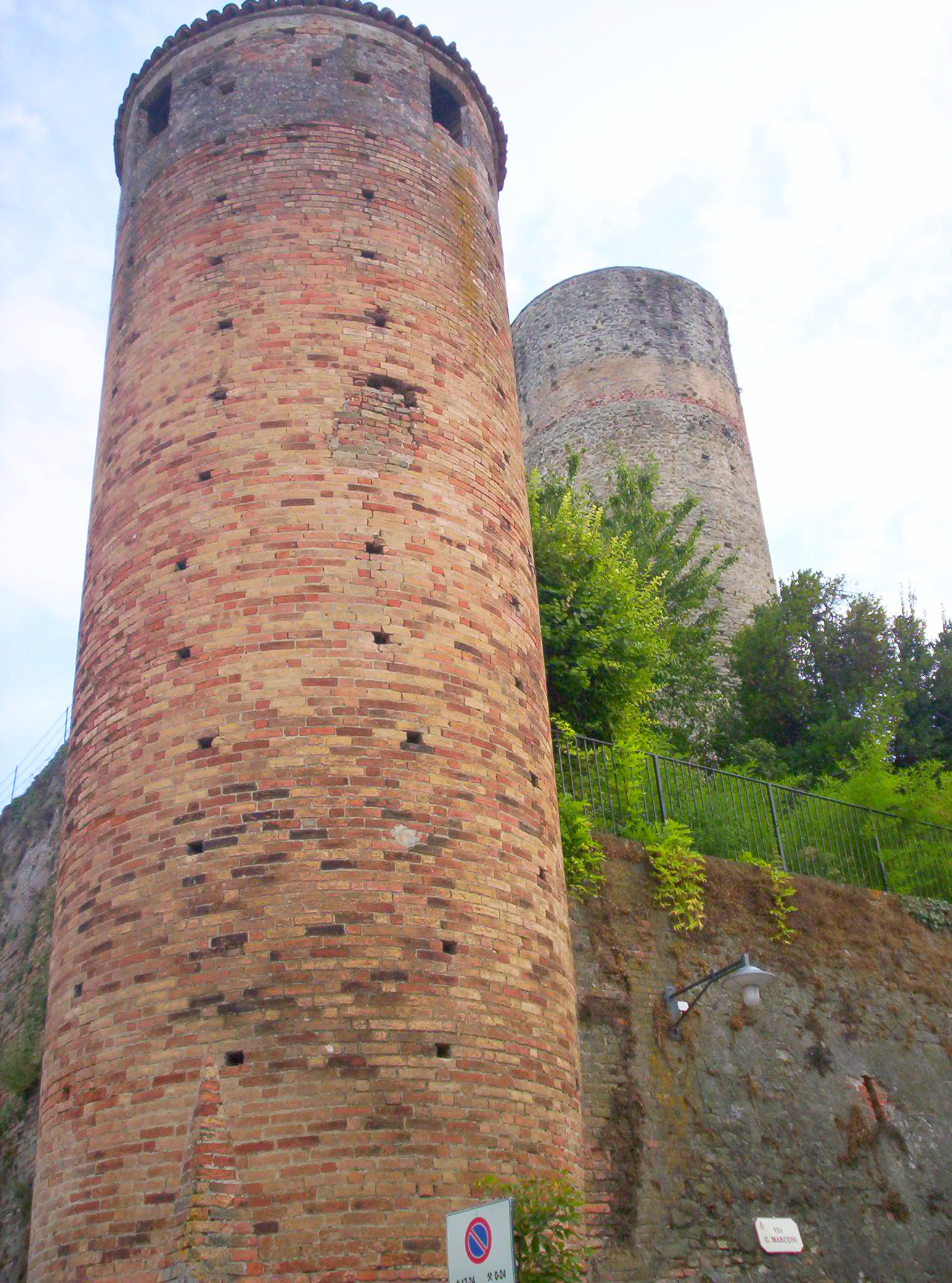 castello di Castiglione Falletto (Cuneo)